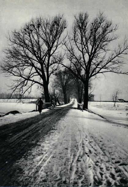 Droga z Zambrowa do Ostrowa.